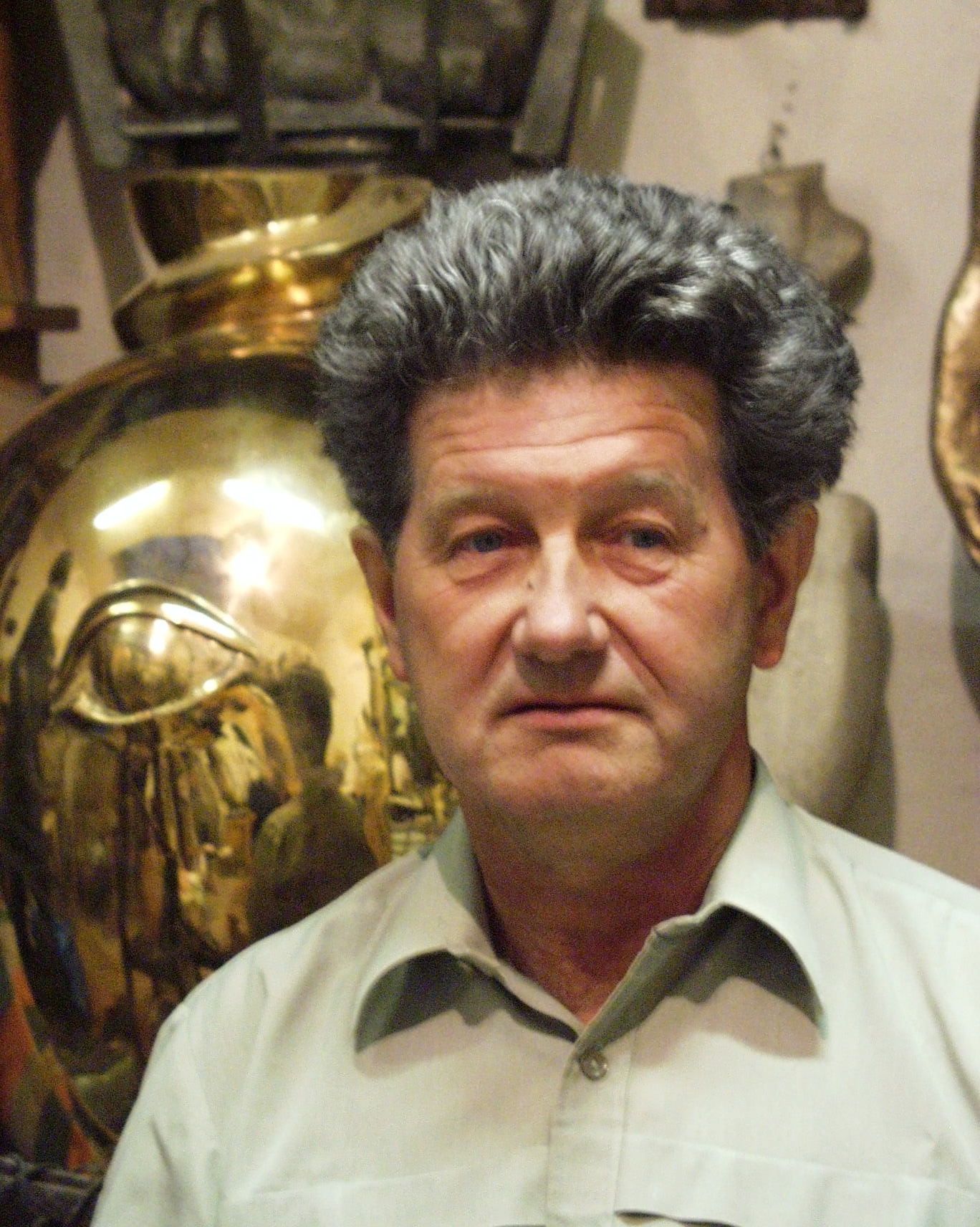 Cestmir Mudrunka